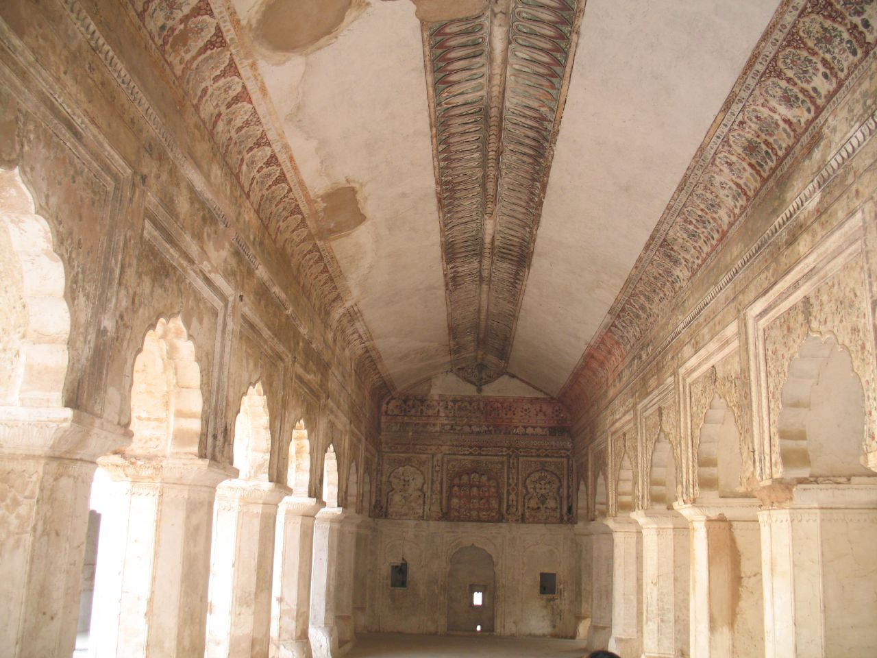 Raja Mahal paintings, Orchha